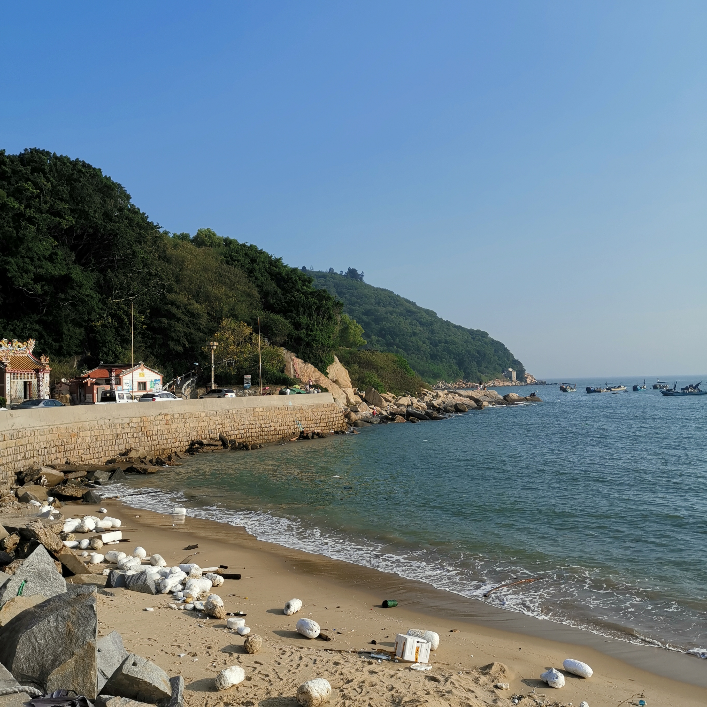 中文（中国大陆）: 澳角村